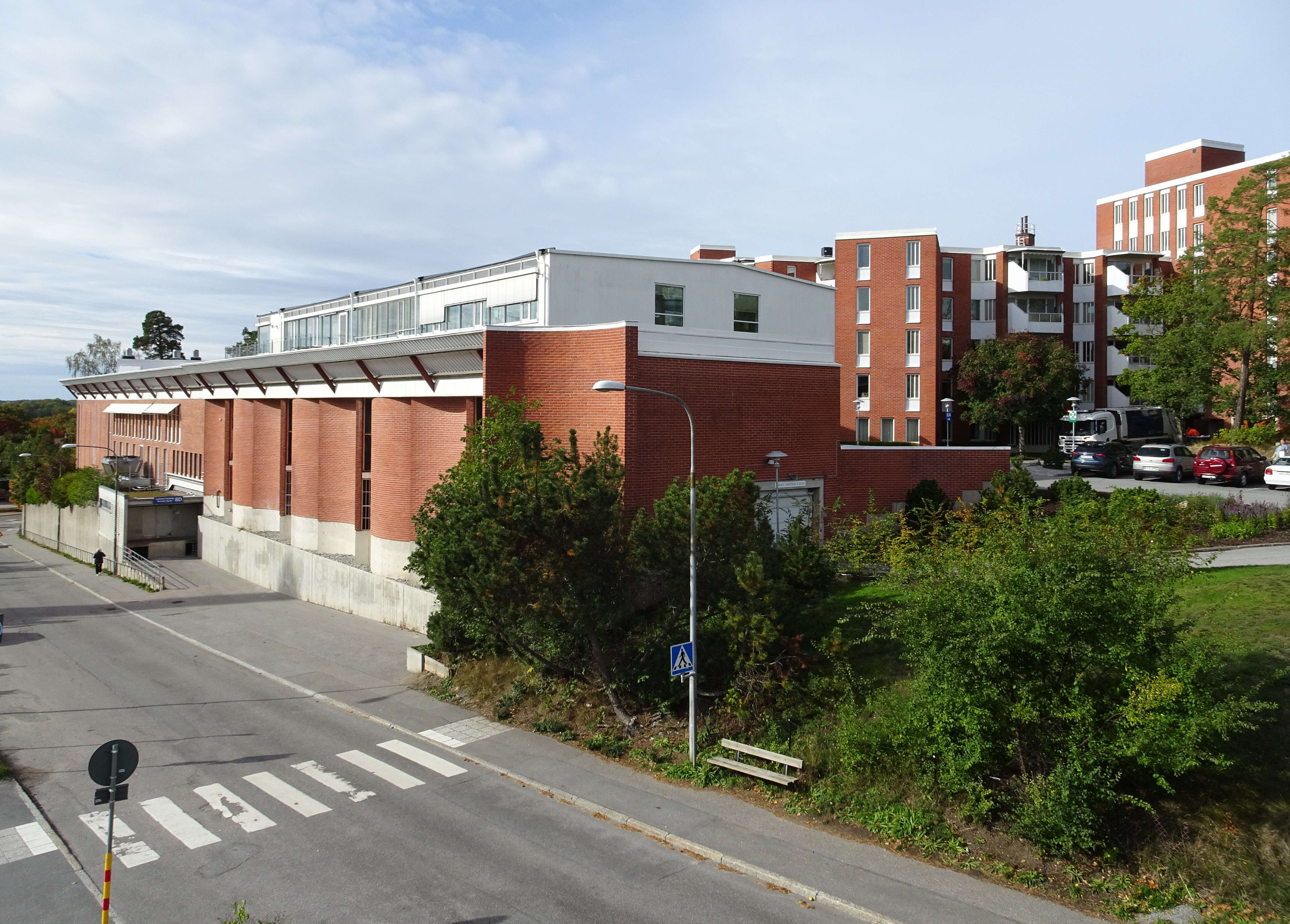 Nockebyhus i Nockebyhov, arkitekt Backström & Reinius, 1973